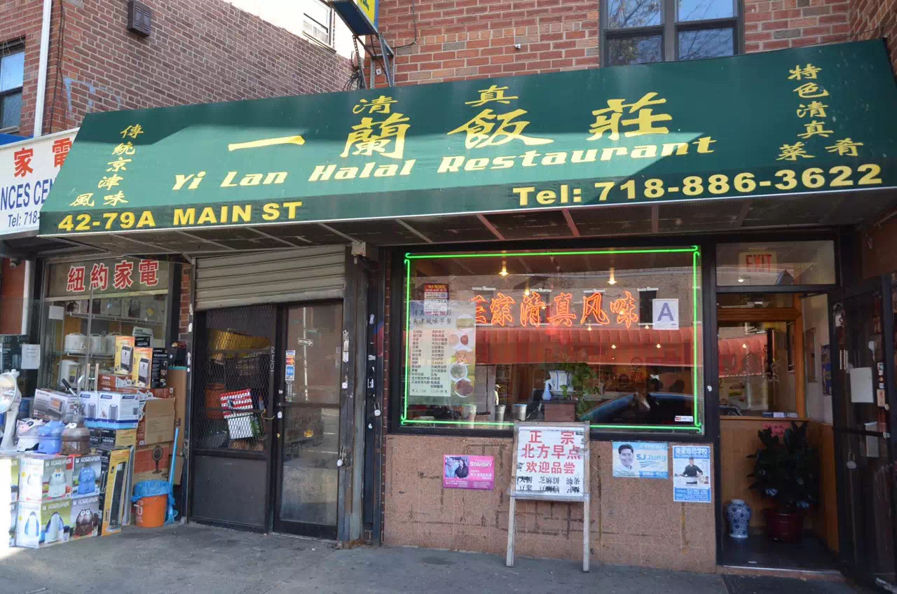 纽约一兰饭庄，有煎饼馃子等天津特色小吃出售